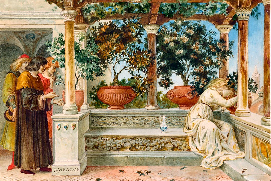 Isabella e il vaso di basilico, acquerello, collezione privata